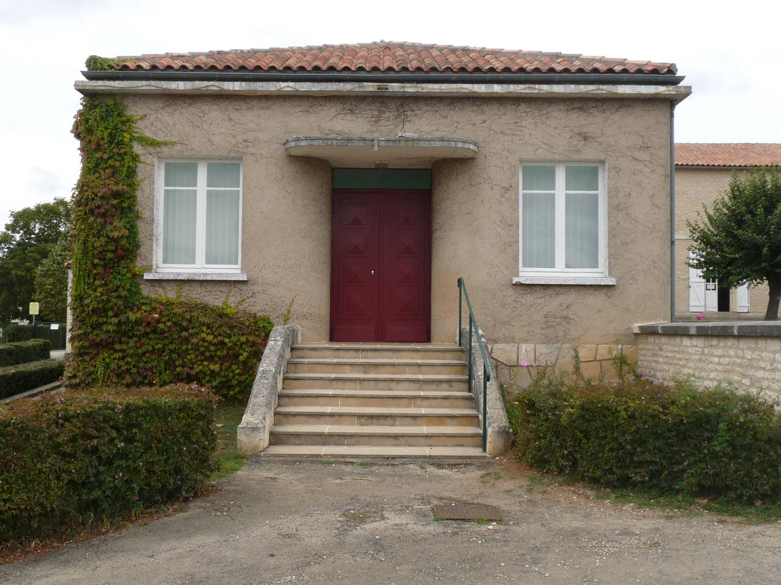 mairie de Taizé-Aizie, Charente, France